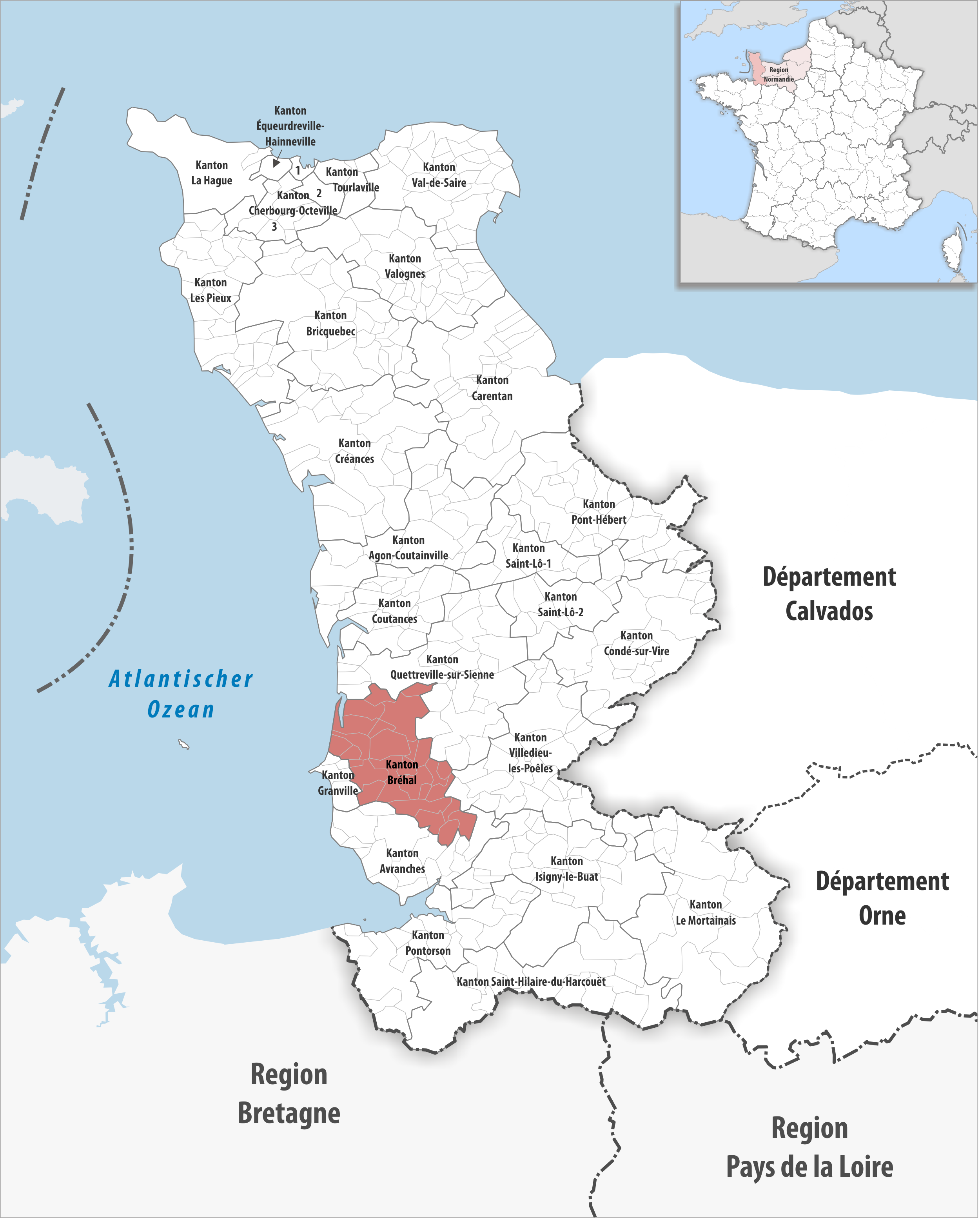 Lage des Kantons Bréhal